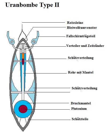 Ontwerp voor de Duitse atoombom.